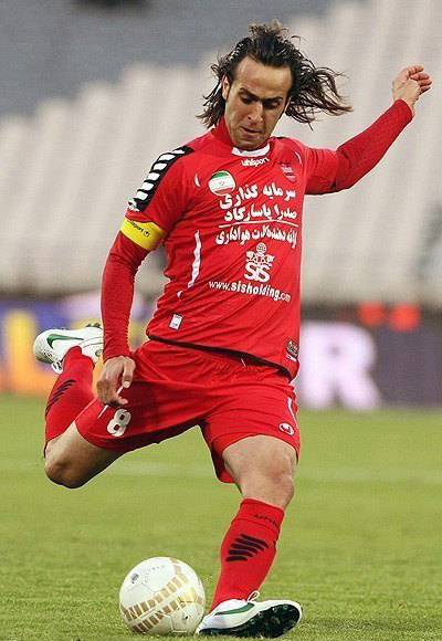 علی کریمی کاپیتان پرسپولیس / پرسپولیس -۴ - نفت تهران ۱ -مرحله یک‌هشتم نهایی بیست و ششمین دوره رقابتهای فوتبال جام حذفی- دی ۱۳۹۱